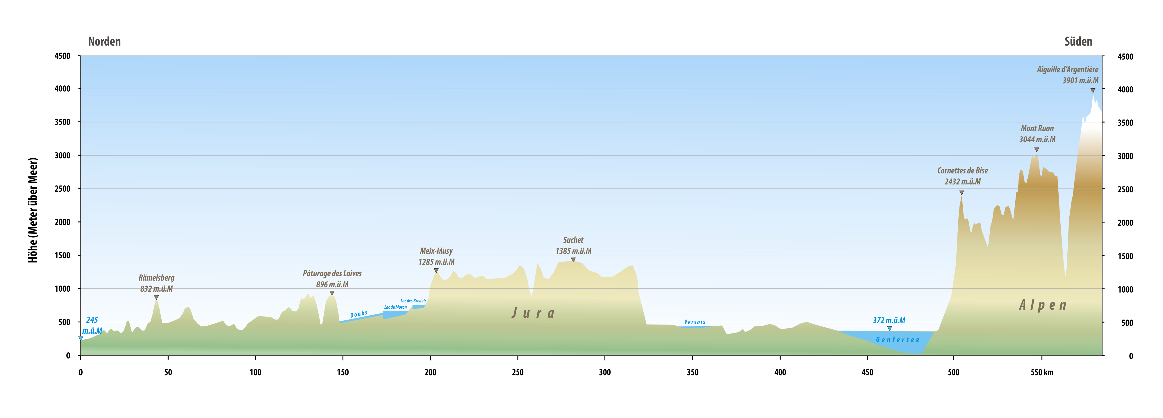 Diagramm des Grenzverlaufes zwischen der Schweiz und Frankreich